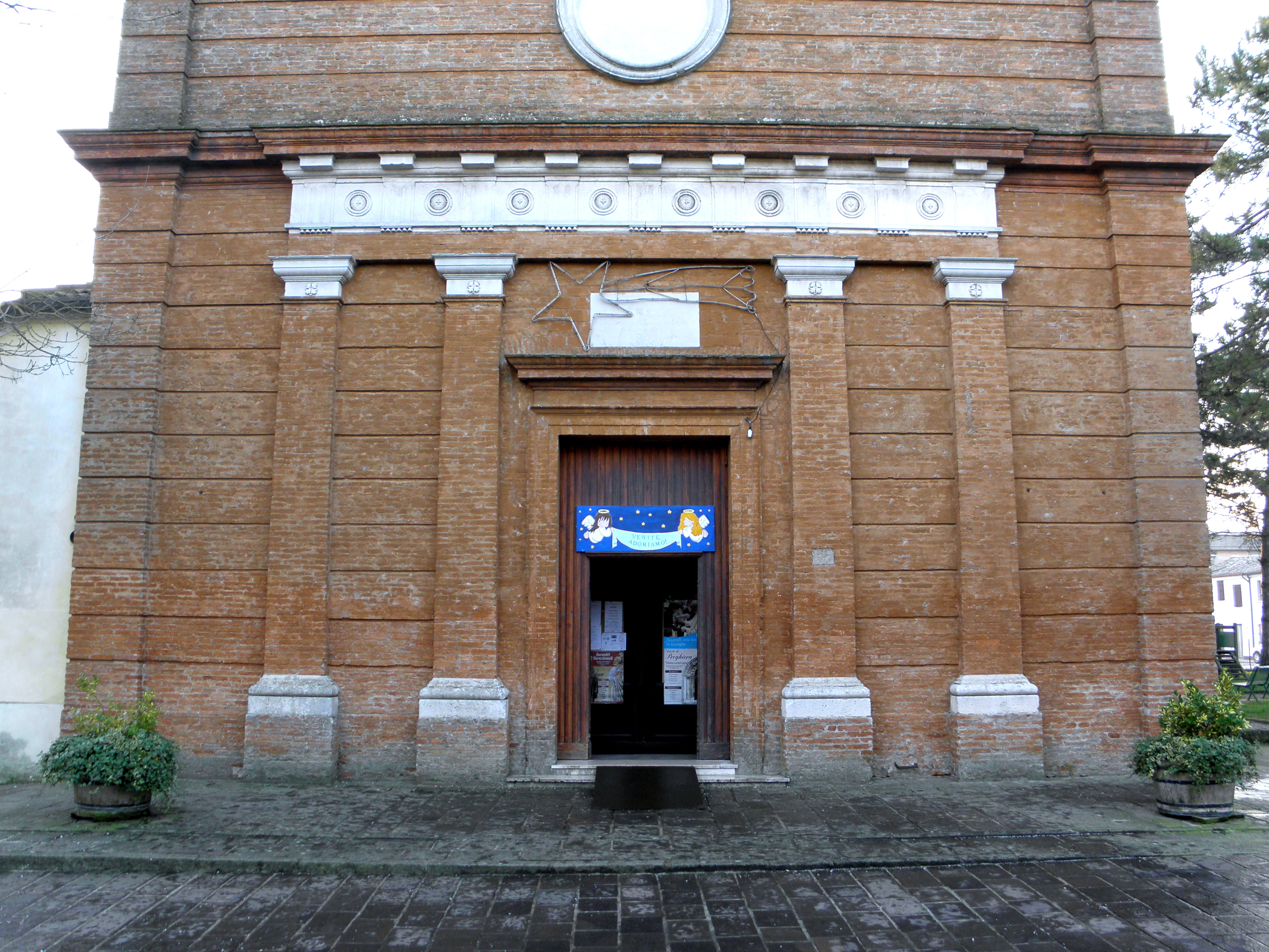 Migliaro, già comune autonomo e dal 2014 frazione di Fiscaglia: la parte inferiore della facciata la chiesa parrocchiale della Natività di Maria Santissima (o di Maria).